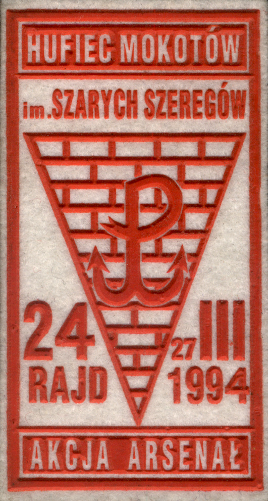 Plakietka Rajdu Arsenał z 1994 roku ('Bohater - drogowskazem przyszłości')